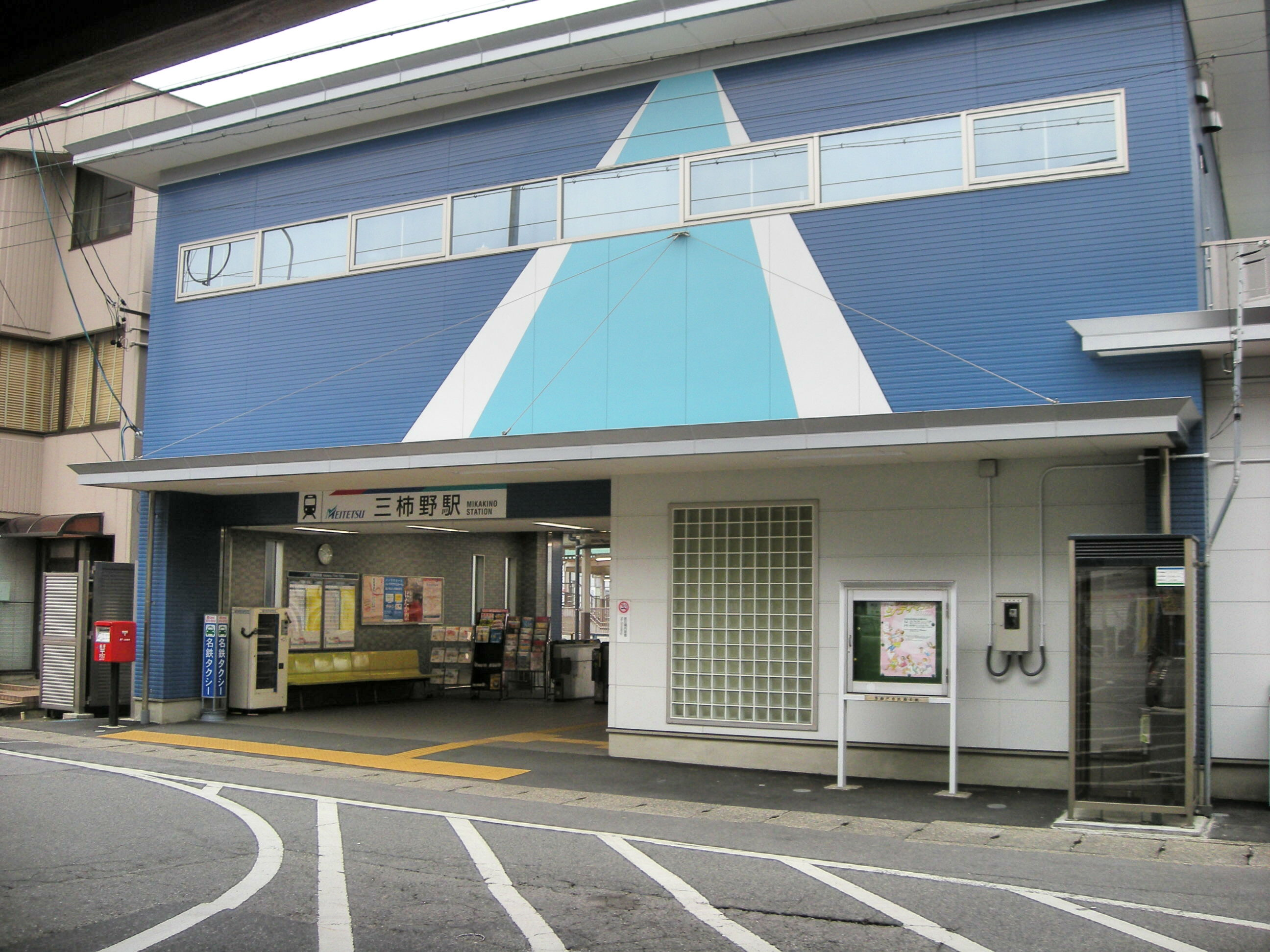 kakamigaharashiyakusyomae station（三柿野駅）